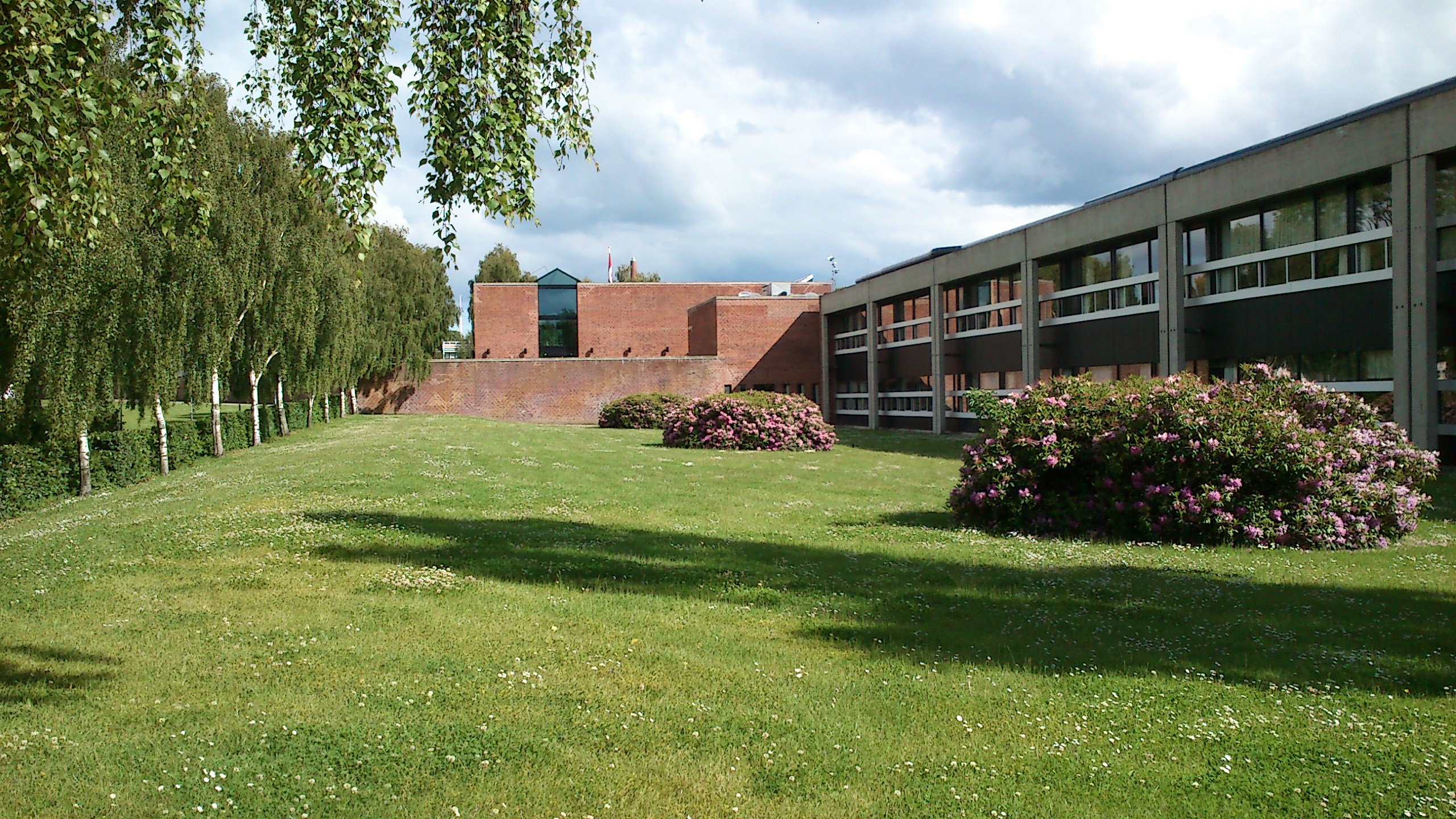 Risskov Gymnasium